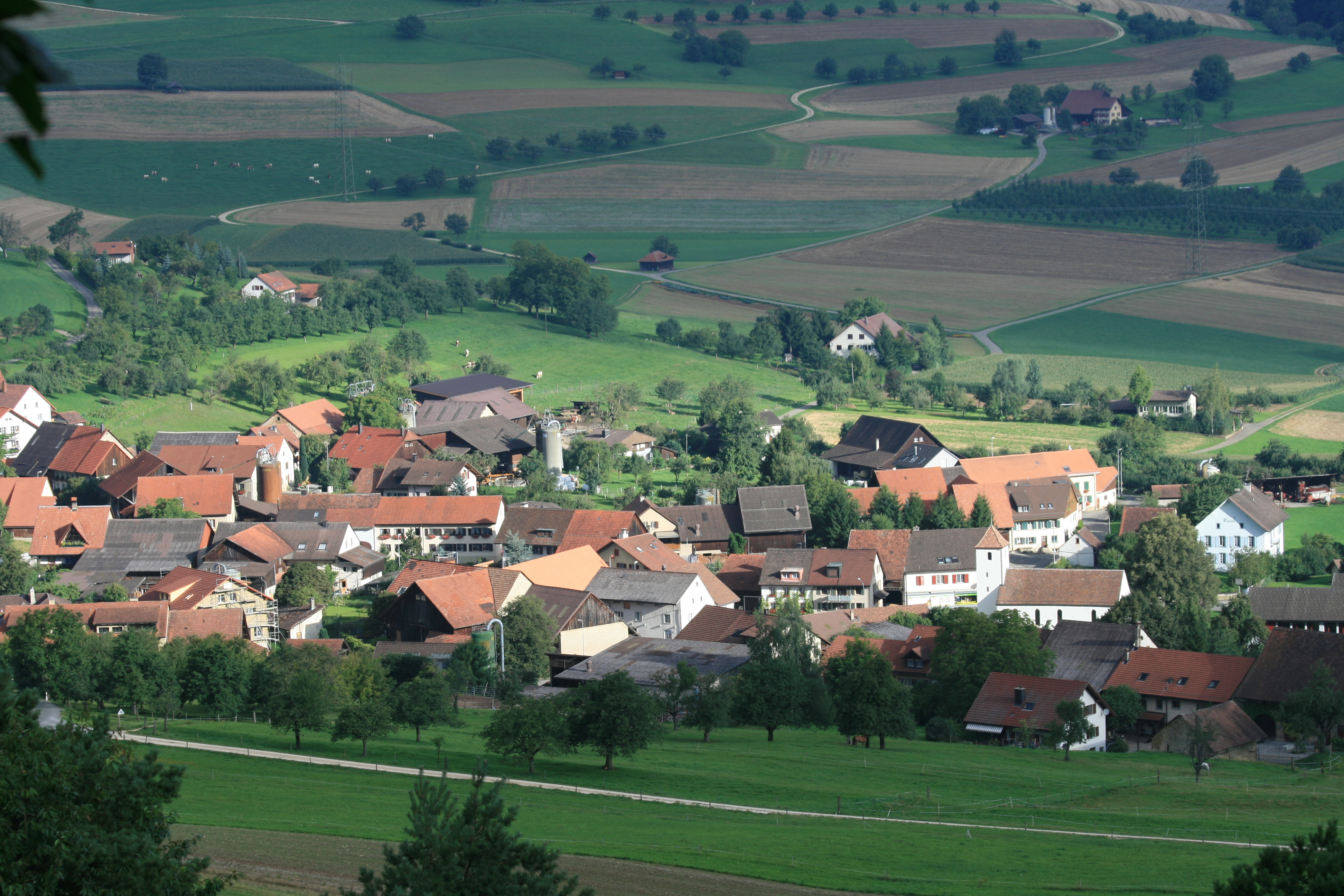 Mandach, Aargau, Schweiz